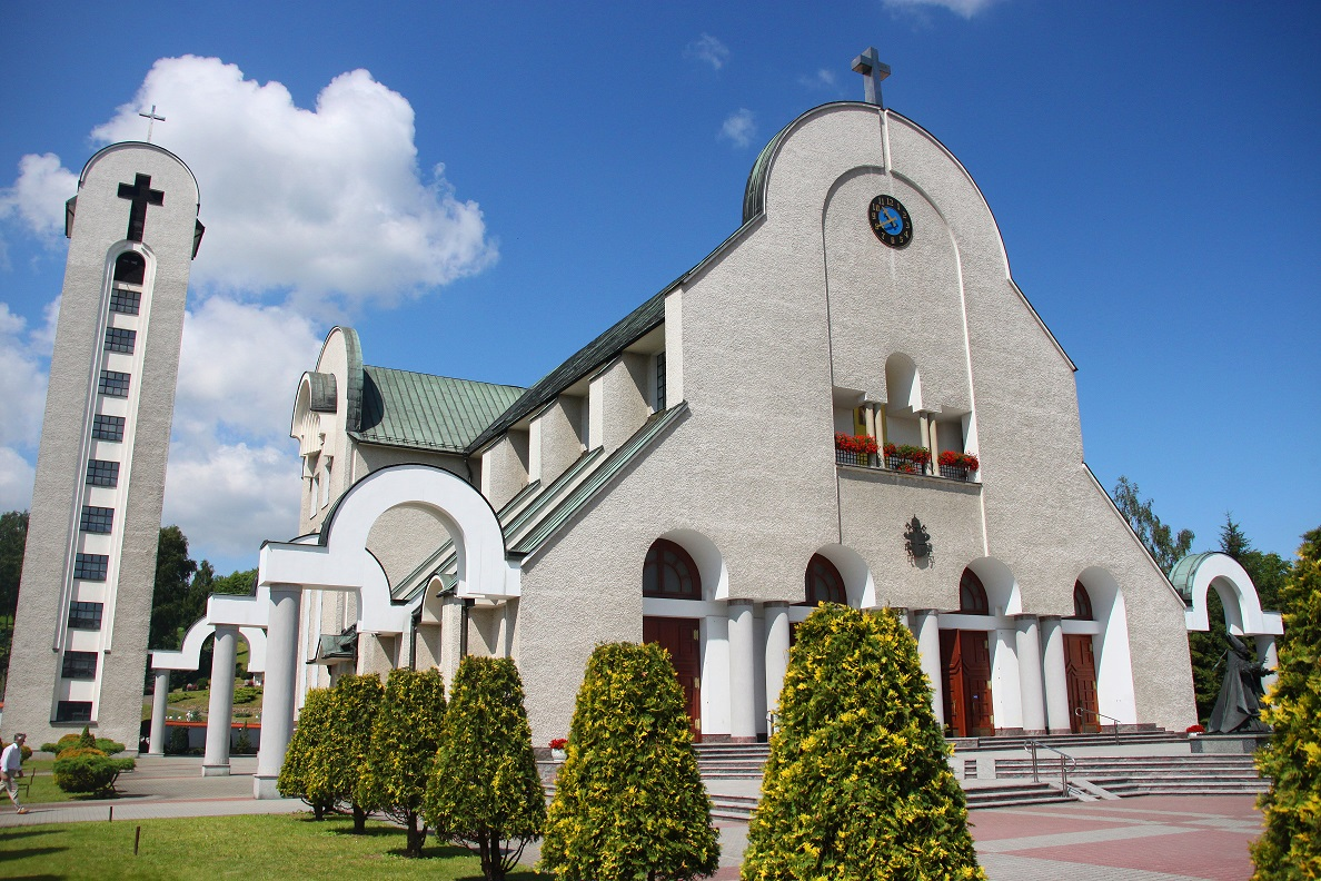 Kościół św. Piotra w Wadowicach